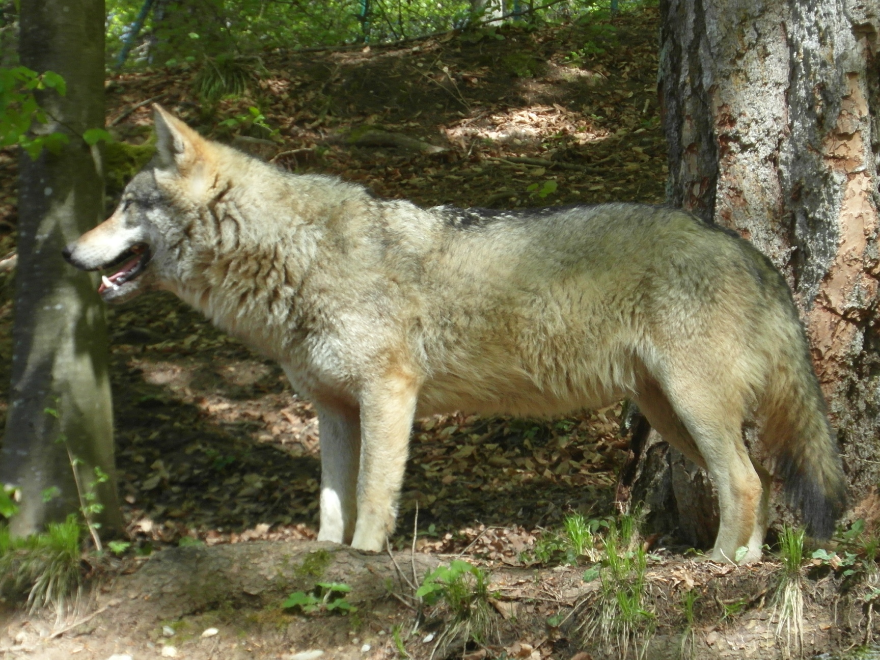 Lupo presso il parco faunistico di Spormaggiore (Tn).